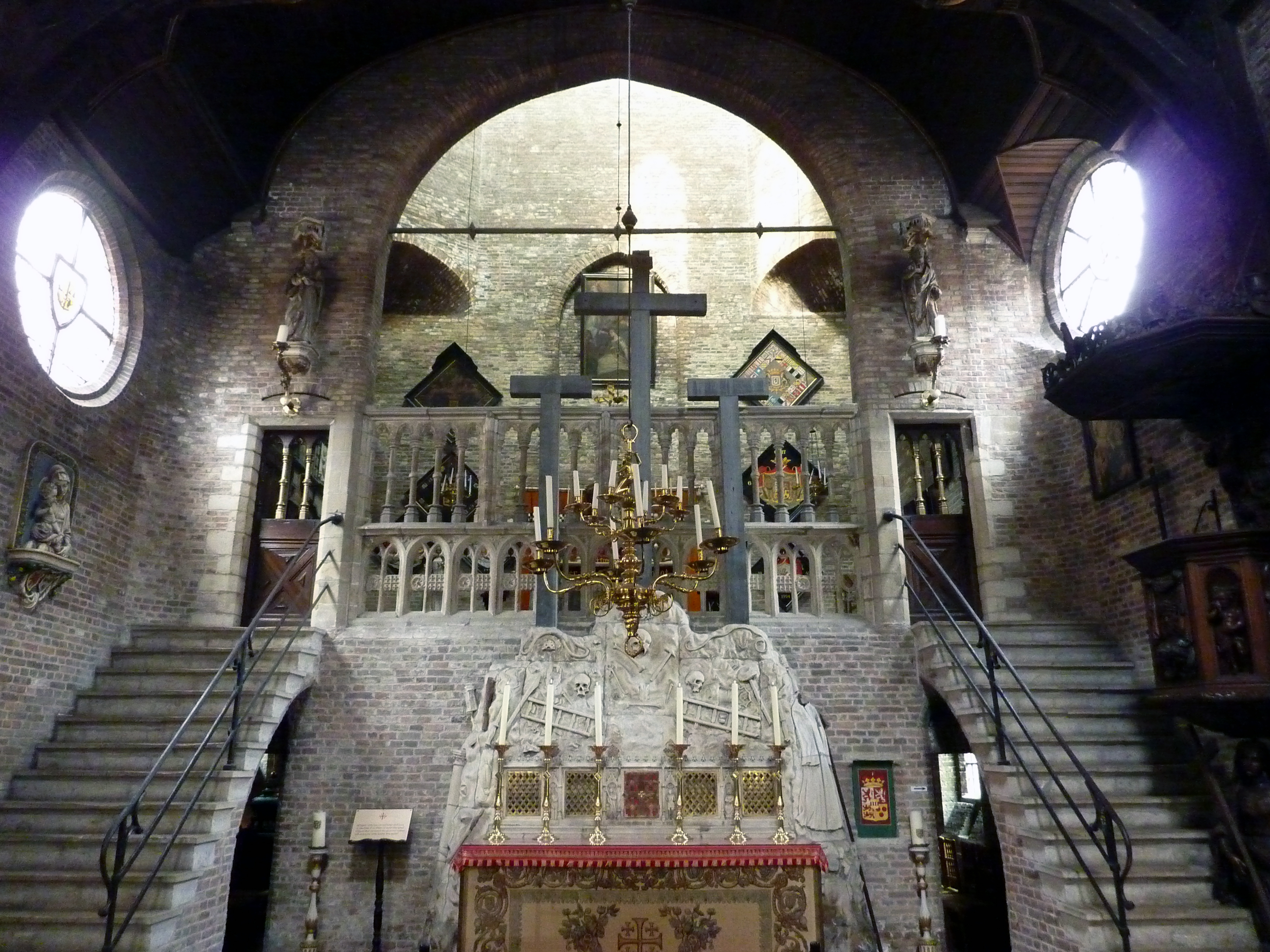 Innenraum der Jerusalemkirche in Bruegge (Belgien)